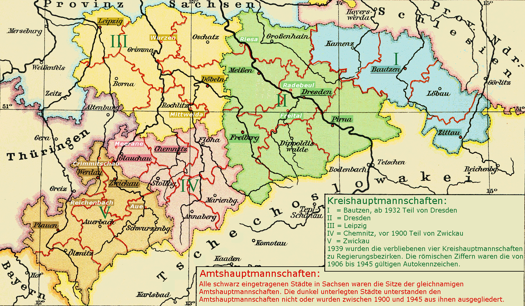 Königreich und Freistaat Sachsen, Verwaltungseinteilung (1815–) 1900–1932 (–1945) This is a part of an old atlas. It does not represent the current situation.